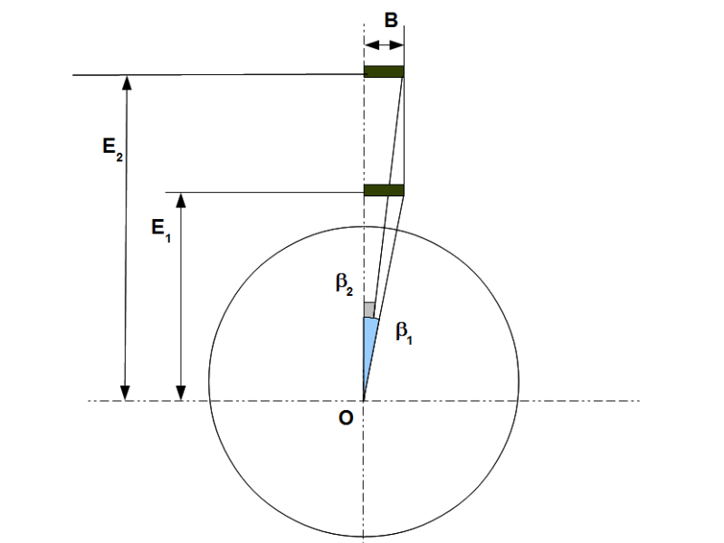 stadiametric rangefinding, principles